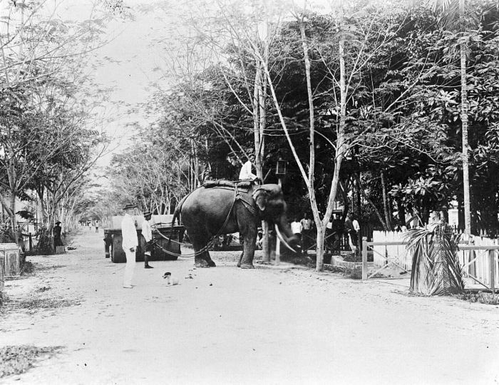 Repronegatief. Met behulp van een olifant, die de wals trekt, wordt een weg te Pangkalan Brandan plat gewalst, Langkat, Sumatra